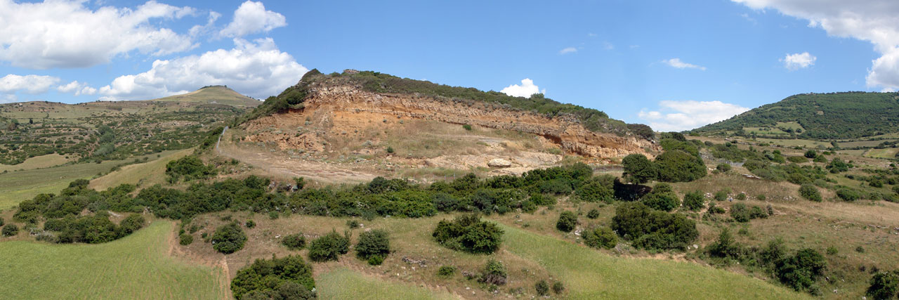 VISTA DEL SITO GEOPALEONTOLOGICO DI CAVA DUIDDURU